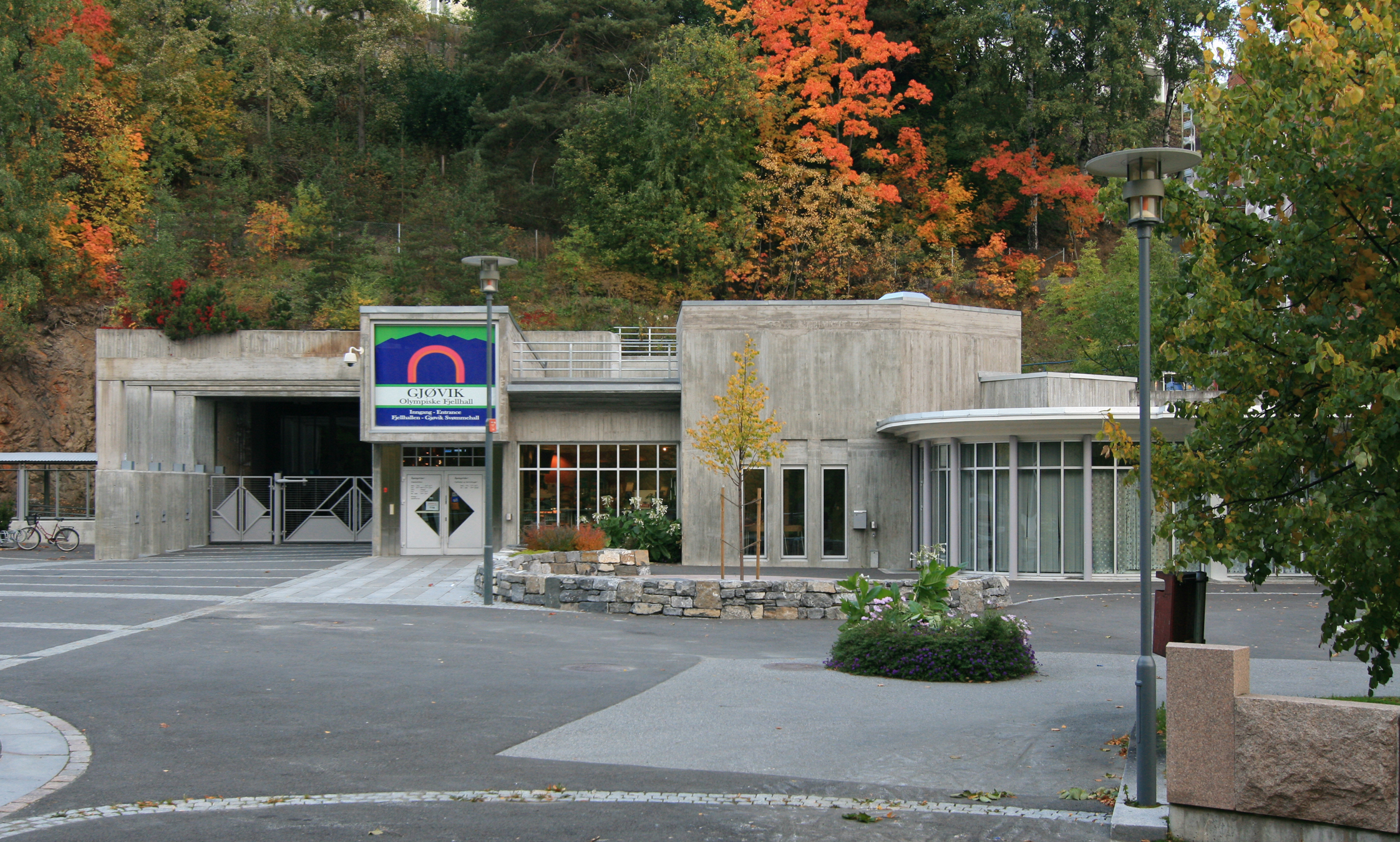 Gjøvik olympiske fjellhall. OL-arena i 1994.